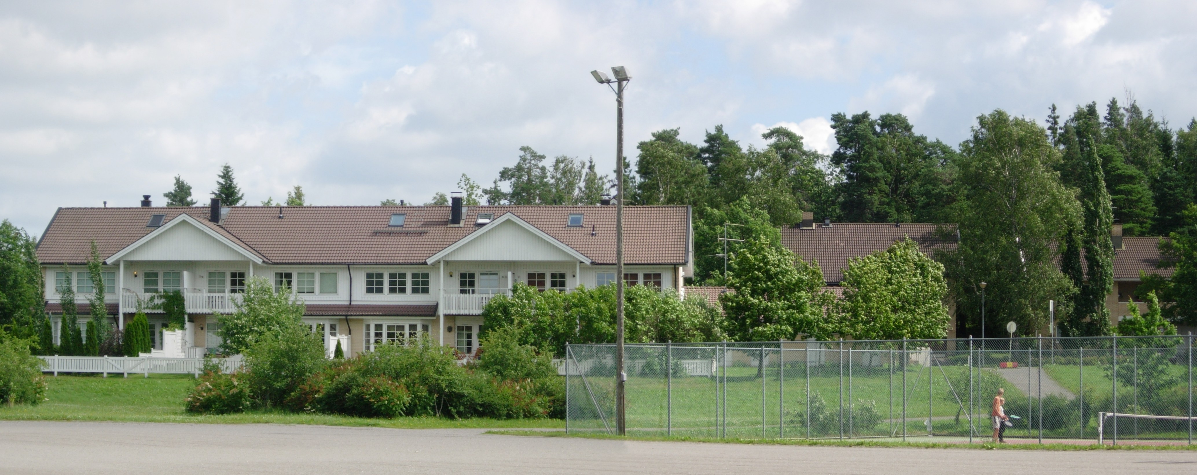 Moikoisten kenttä, Hirvensalo